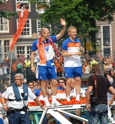 Arjen Robben & Dirk Kuyt